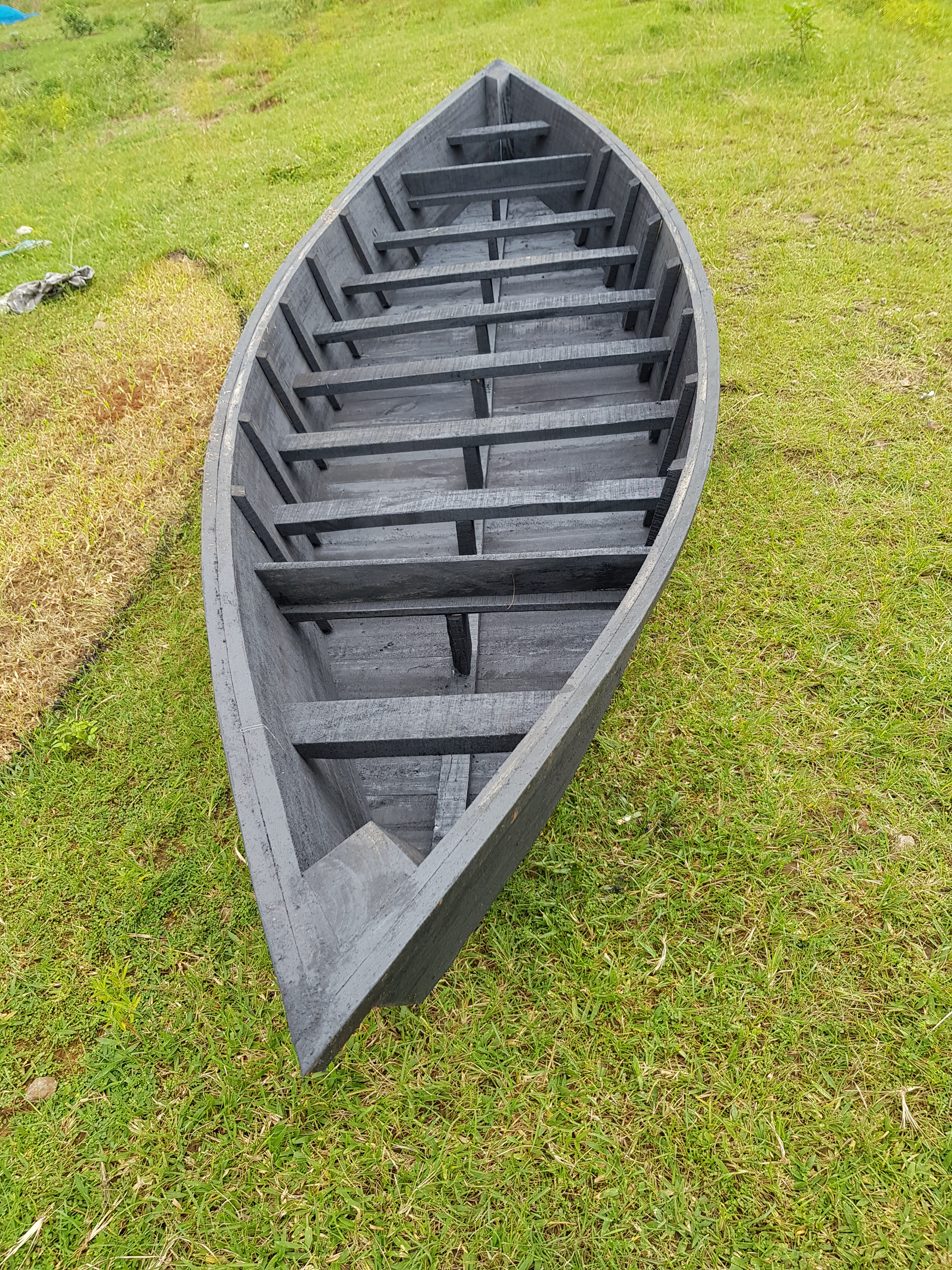 ছবিটি ঢাকার কায়েতপাড়া বাজারের পাশে থেকে ৩১ জুলাই ২০১৮ সালে তুলা। এই নৌকার হাটে বাড্ডা, সাতারকুল, ডেমরা, মুড়াপাড়া ও রূপগঞ্জ থেকে ক্রেতা আসেন। তবে এখন হাট আগের মতো জমে না। আগে নৌকা তৈরির জন্য অনেক শ্রমিক ছিলেন। এখন তাঁরা বিভিন্ন দিকে চলে গেছেন।